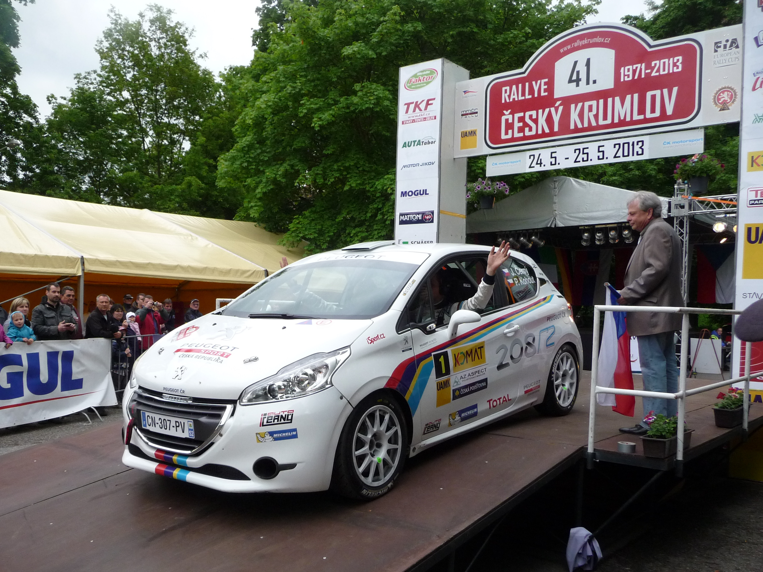 Posádka Černý-Kohout s Peugeotem 208 R2 na startu 41. Rally Český Krumlov.